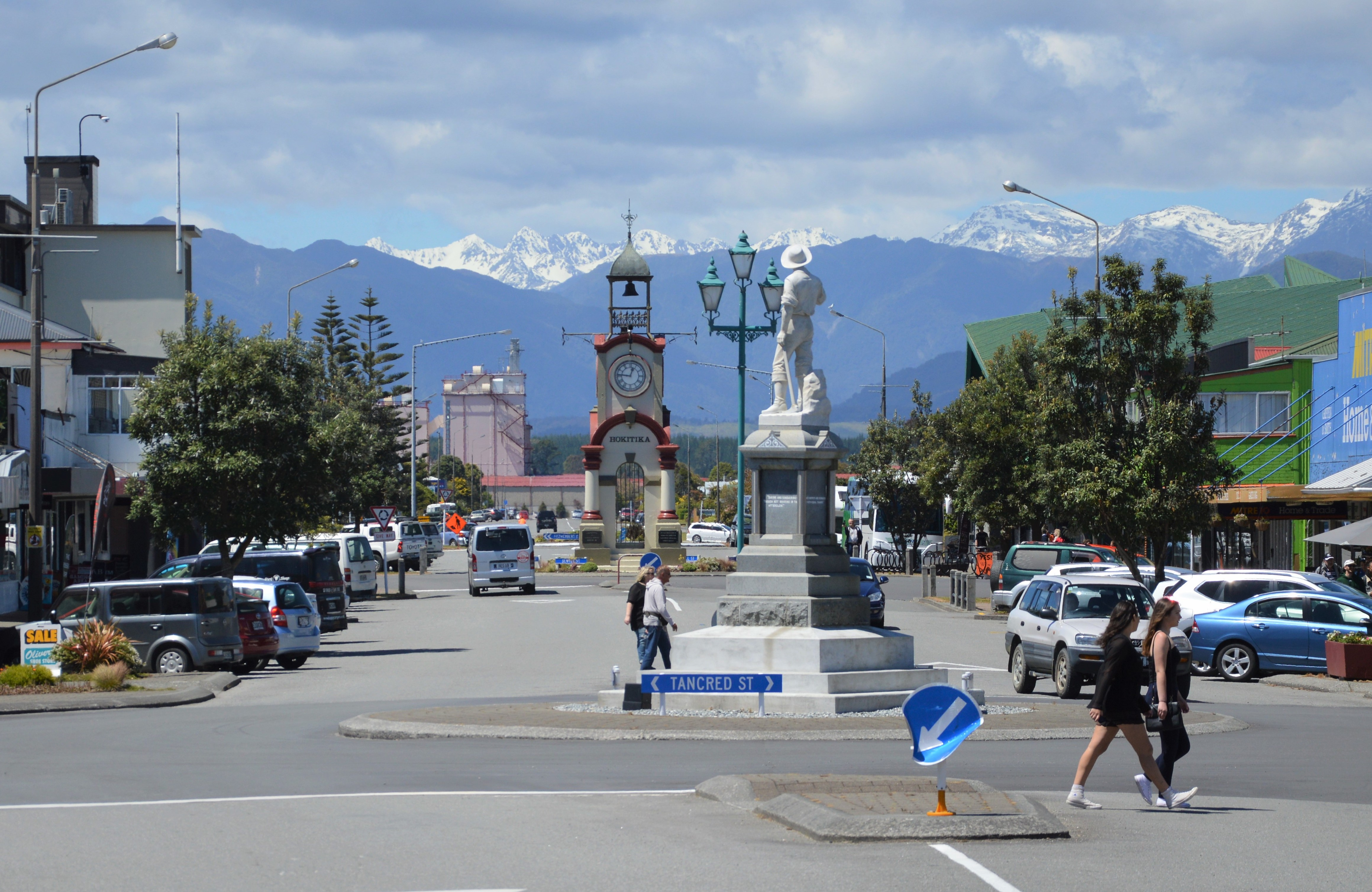 Hokitika